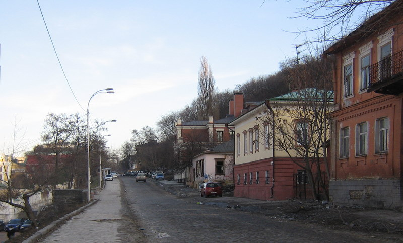 вулиця Боричів Тік у Києві